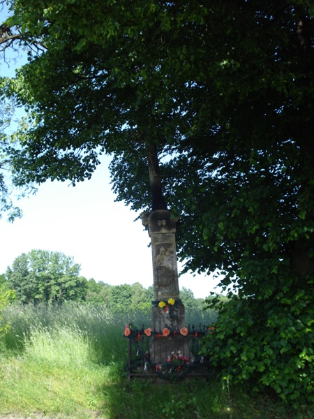 kapliczka przy wjeździe do Bucza, 1877 rok.